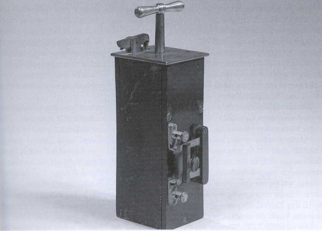 Siegfried Marcus, blasting machine, "Wiener Zünder", 1864